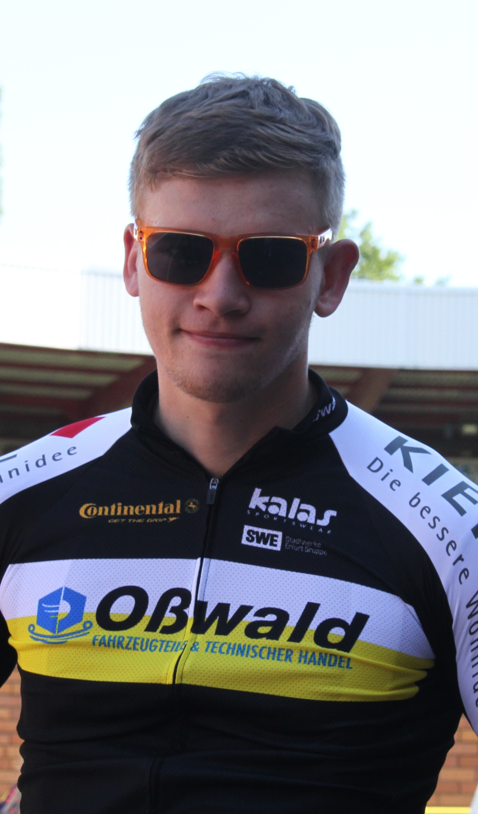 Jan May, deutscher Radsportler